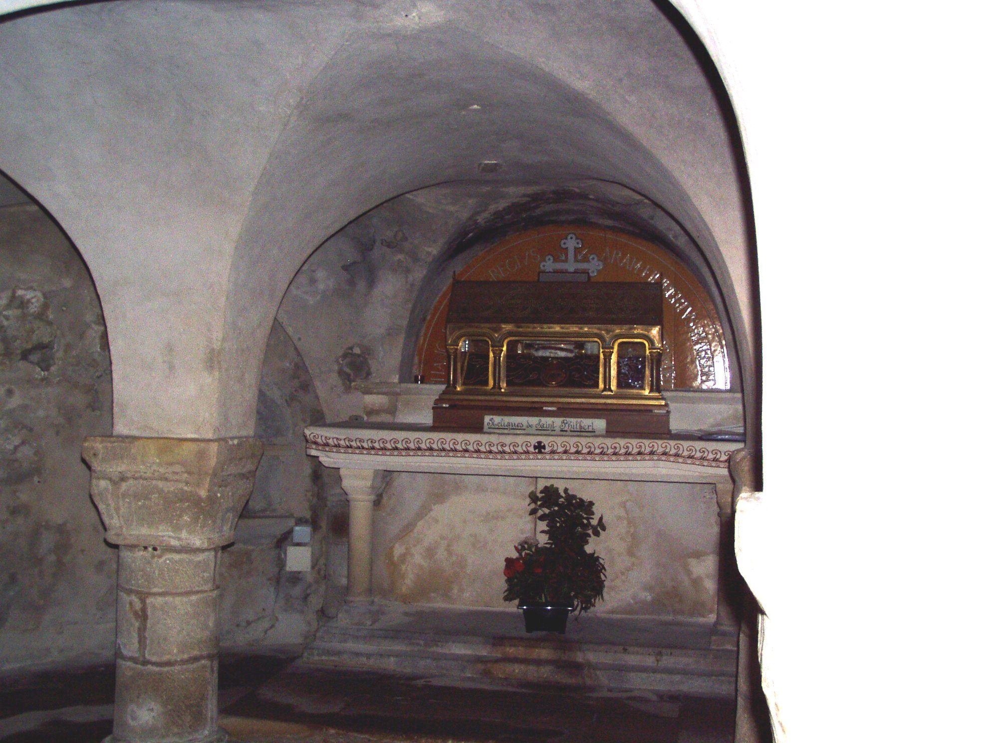 Chasse de Saint-Philbert dans la crypte de l'église de Noirmoutier .